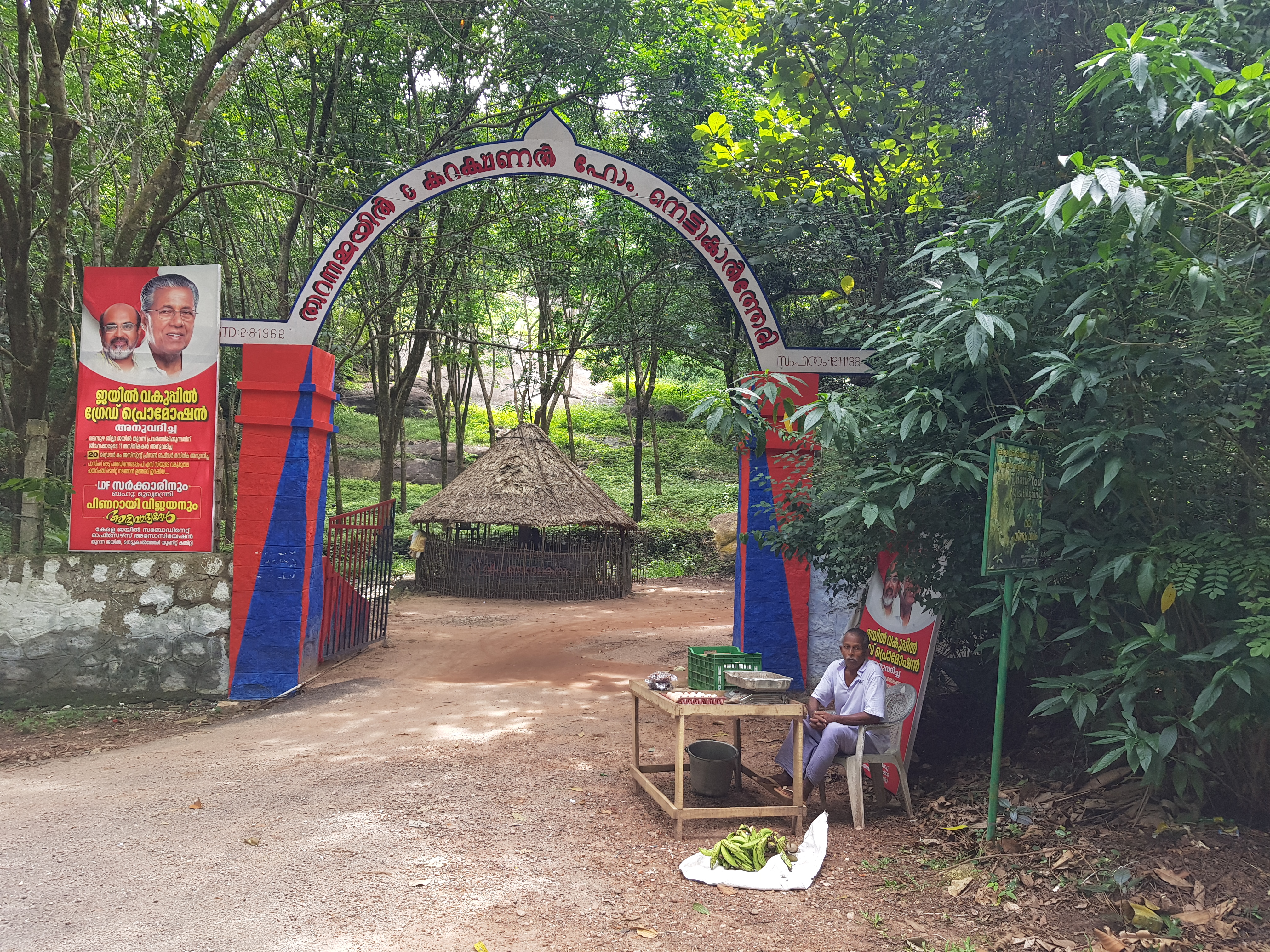 Nettukaltheri